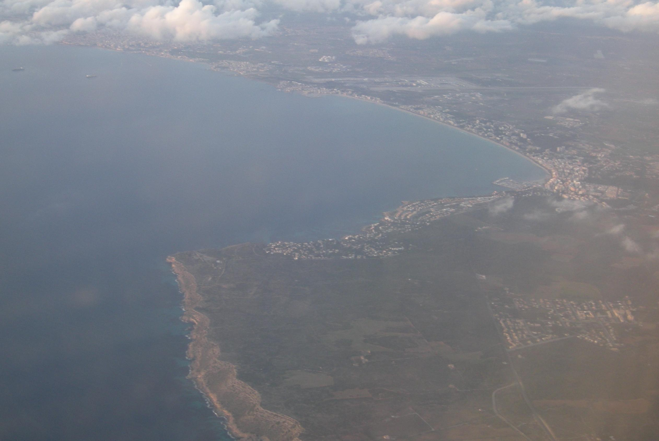 Cap Enderrocat a Mallorca. Es pot observar l'Arenal i, darrera els niguls, Palma.